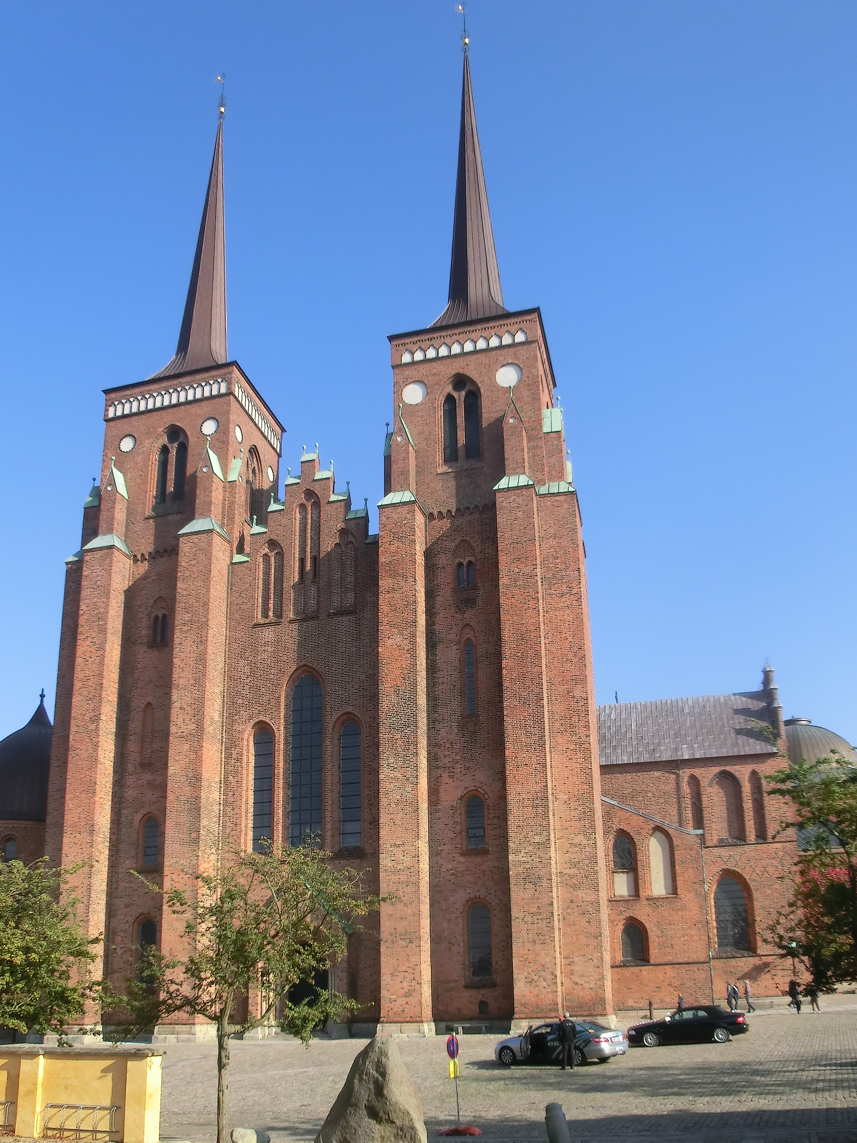 Cattedrale di Roskilde